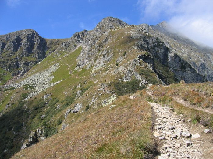 Großer Bösenstein, von Südosten aus gesehen, rechts dahinter die Sonntagskarspitze, links der Kleine Bösenstein